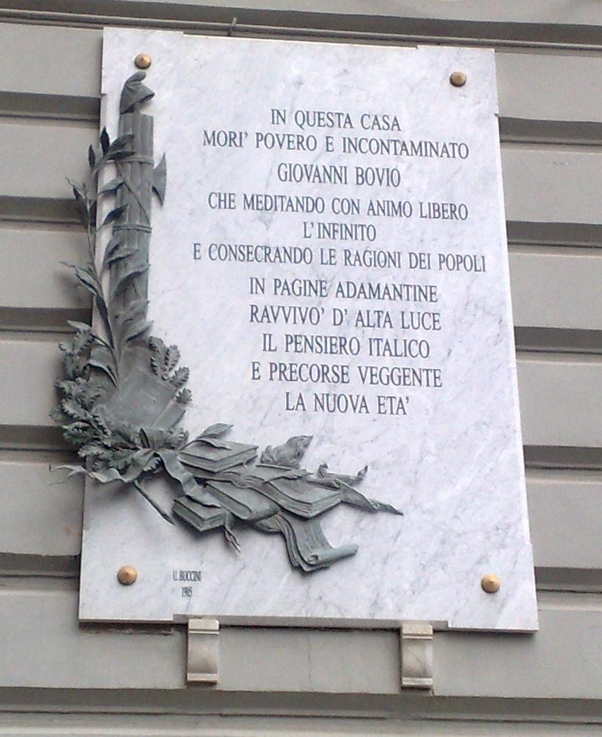 Targa in memoria di Giovanni Bovio. Affissa nel palazzo in cui ha vissuto il poeta a Napoli. In piazza Giovanni Bovio (Piazza Borsa).